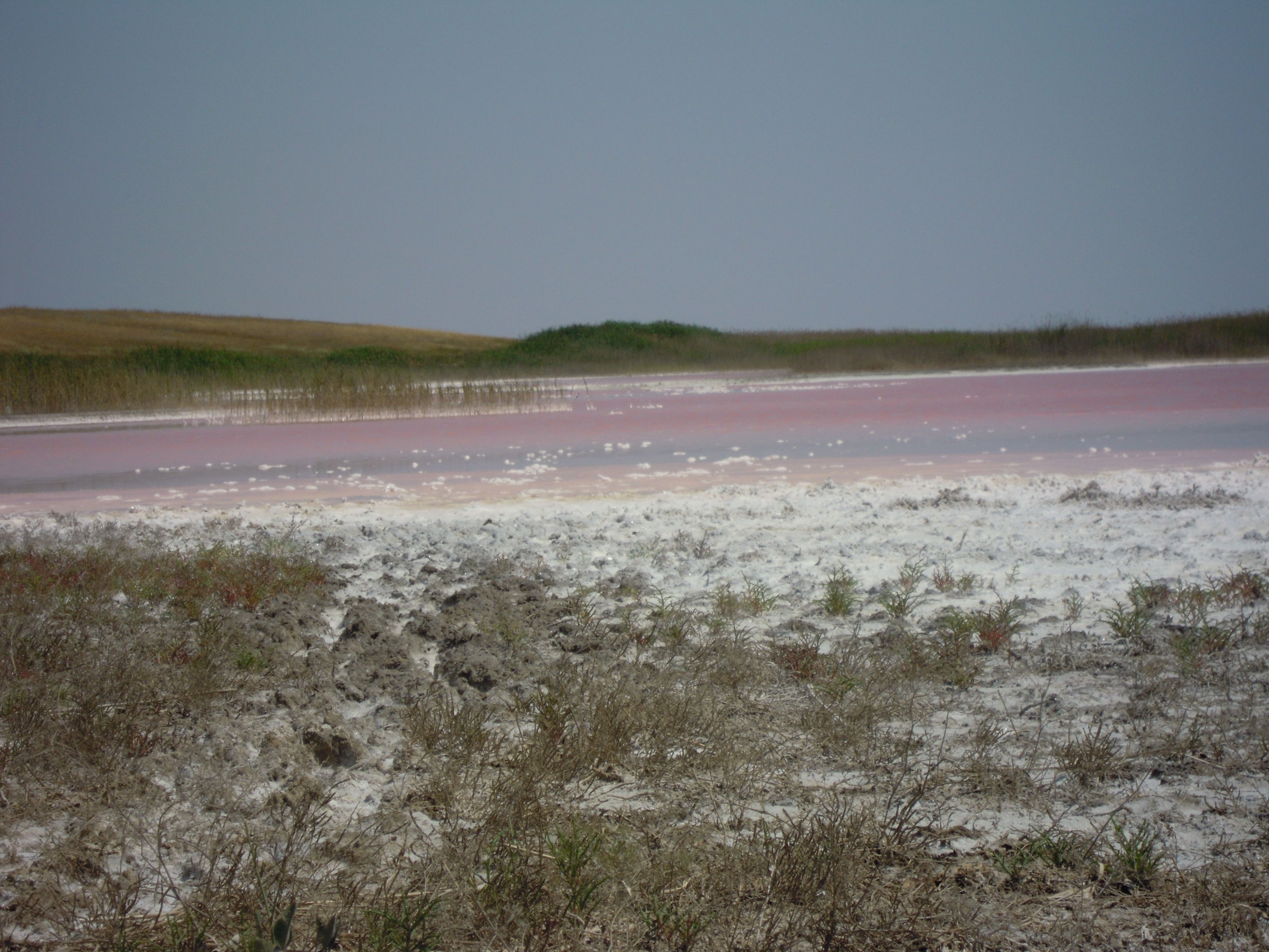 Siwaschsee: Herkunft der Sivash-Heilerde und des rosafarbenen Heilsalzes